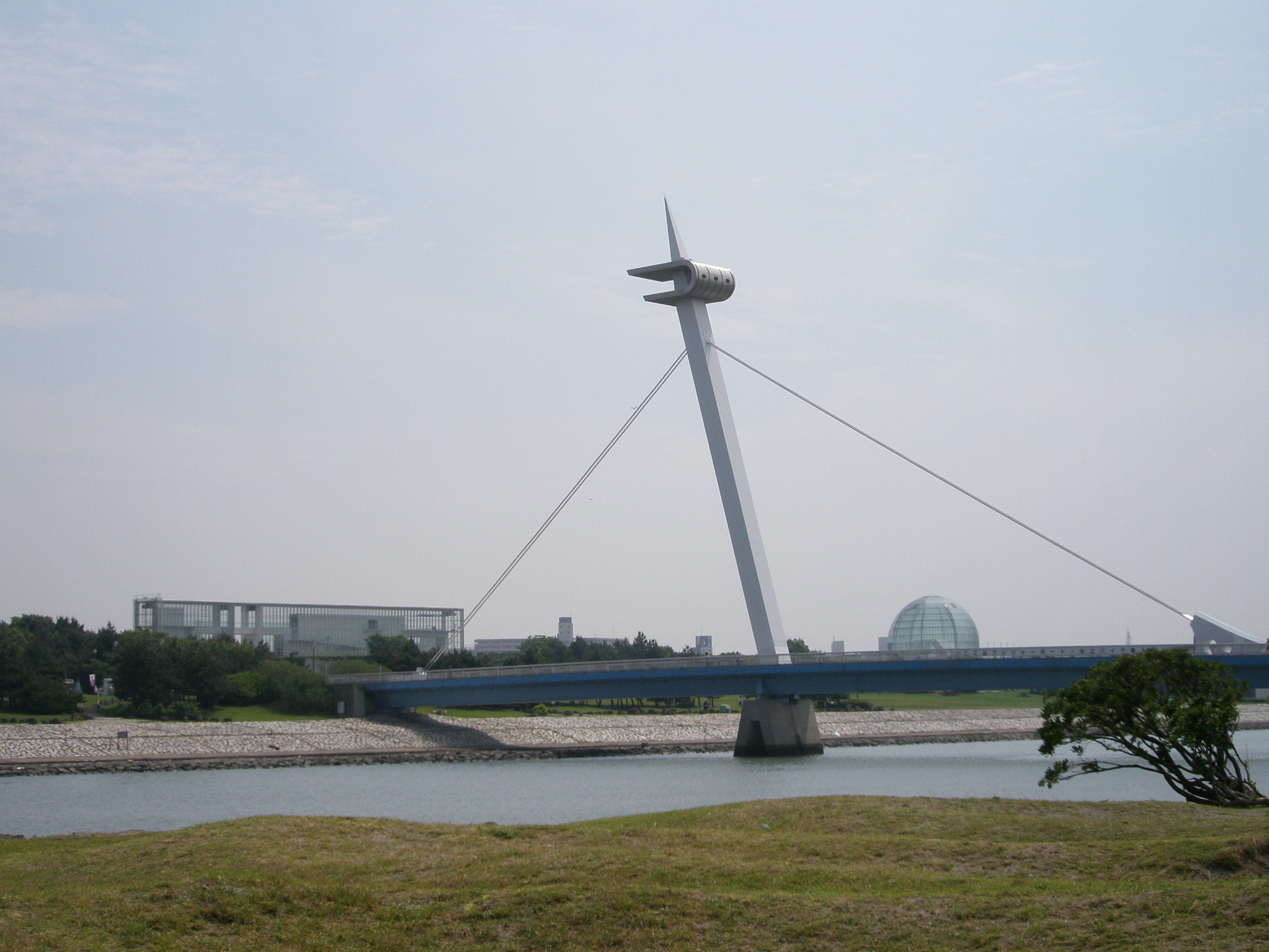 葛西臨海公園と葛西海浜公園西なぎさを結ぶ葛西なぎさ橋